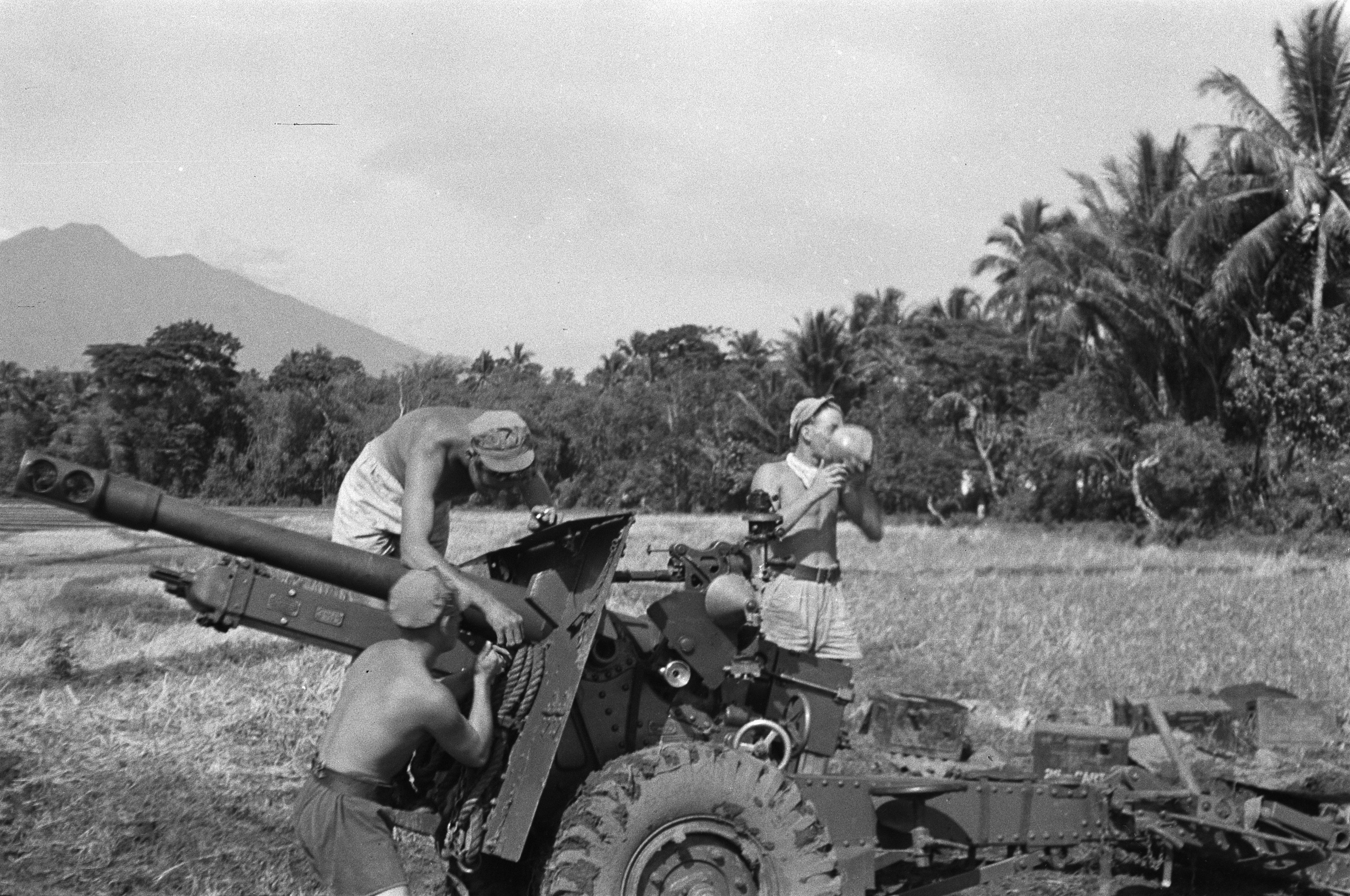 Collectie / Archief : Fotocollectie Dienst voor Legercontacten Indonesië Reportage / Serie : [DLC] Zuiveringsacties II-2 RVA bij Salatiga Beschrijving : Reksosari: kanonniers van 2-2 bij hun 25-ponder Datum : 23 oktober 1947 Locatie : Indonesië, Nederlands-Indië Fotograaf : Burgt, Th. van de / DLC Auteursrechthebbende : Nationaal Archief Materiaalsoort : Negatief (zwart/wit) Nummer archiefinventaris : bekijk toegang 2.24.04.02 Bestanddeelnummer : 3828